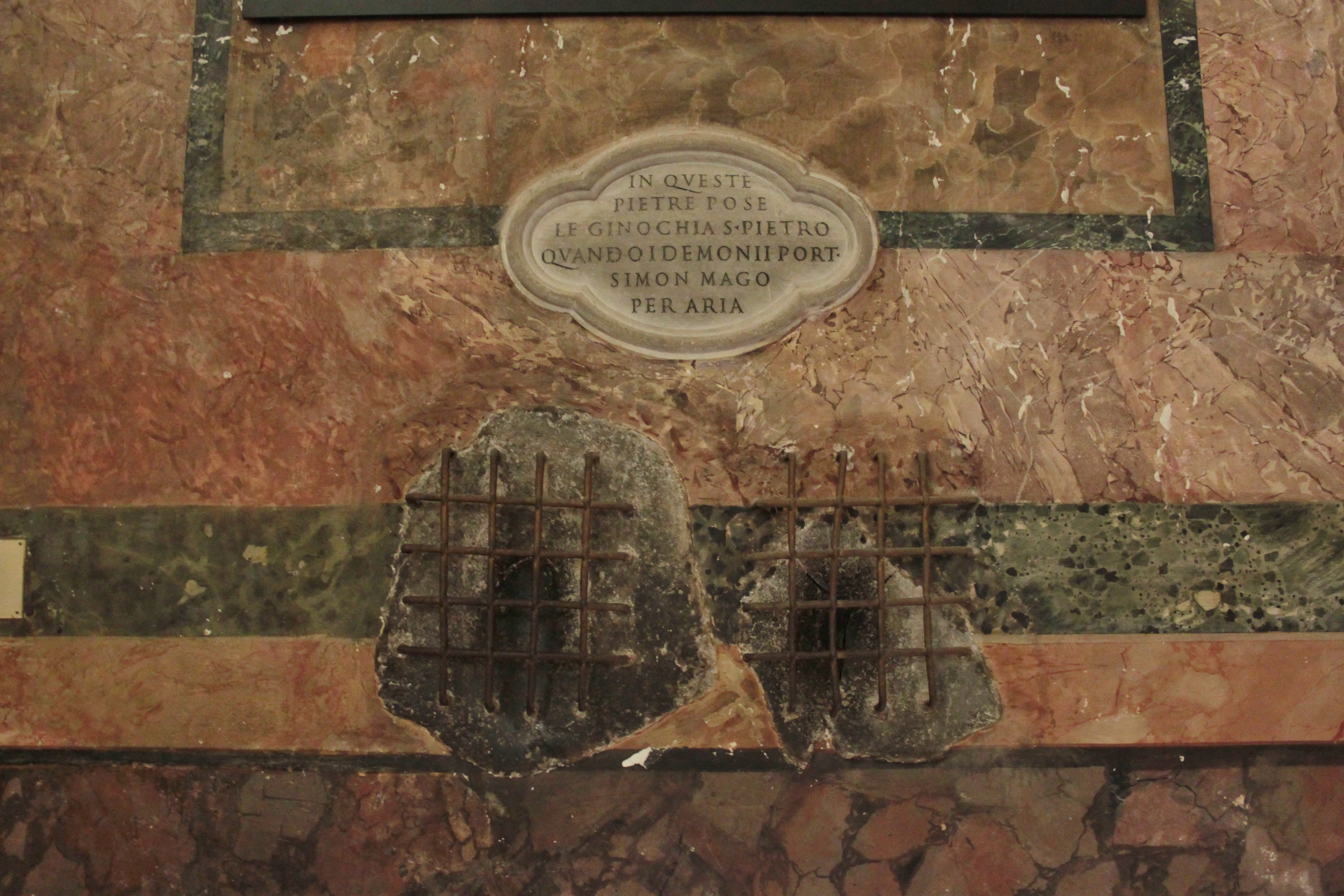 Lápidas con las marcas de las rodillas de san Pedro, las cuales, al construir la basílica de Santa Francesca Romana, se colocaron en la pared; dentro del Foro Romano.